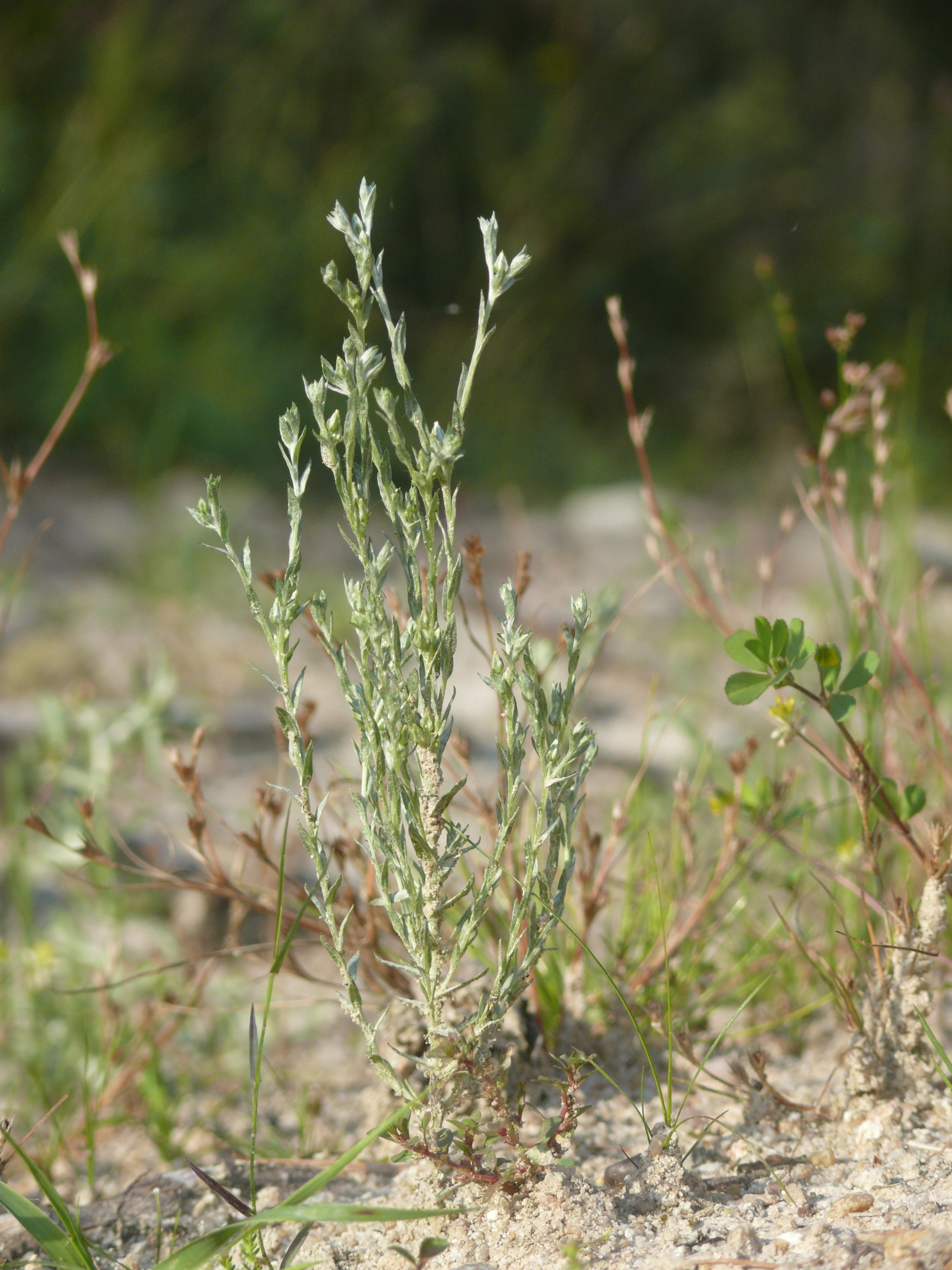 Filago minima, Frankenhöhe